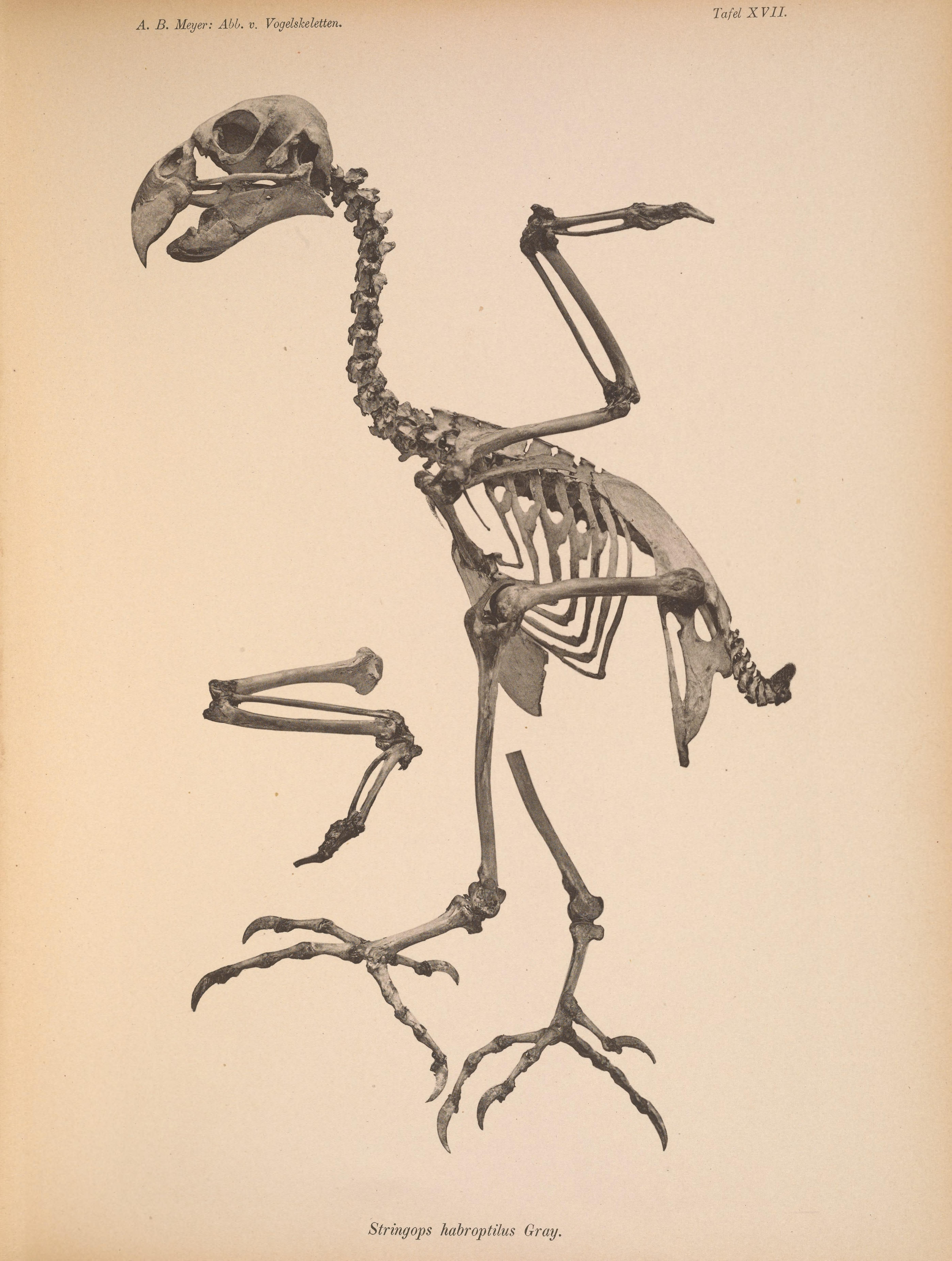 Strigops habroptilus